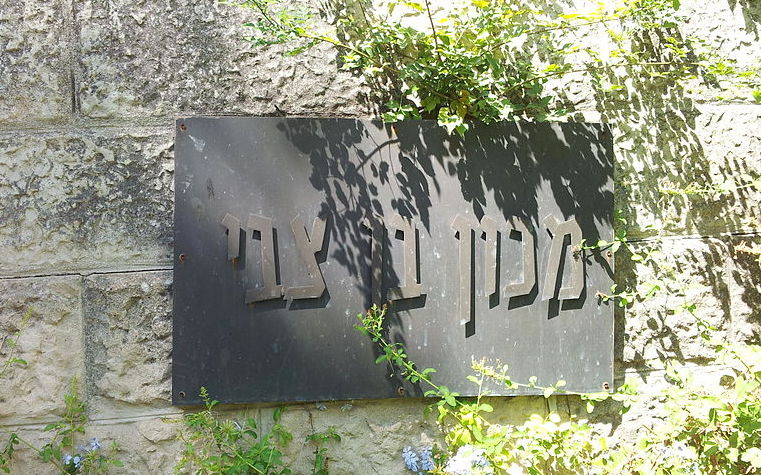 שלט מכון בן צבי במתחם יד יצחק בן צבי בירושלים